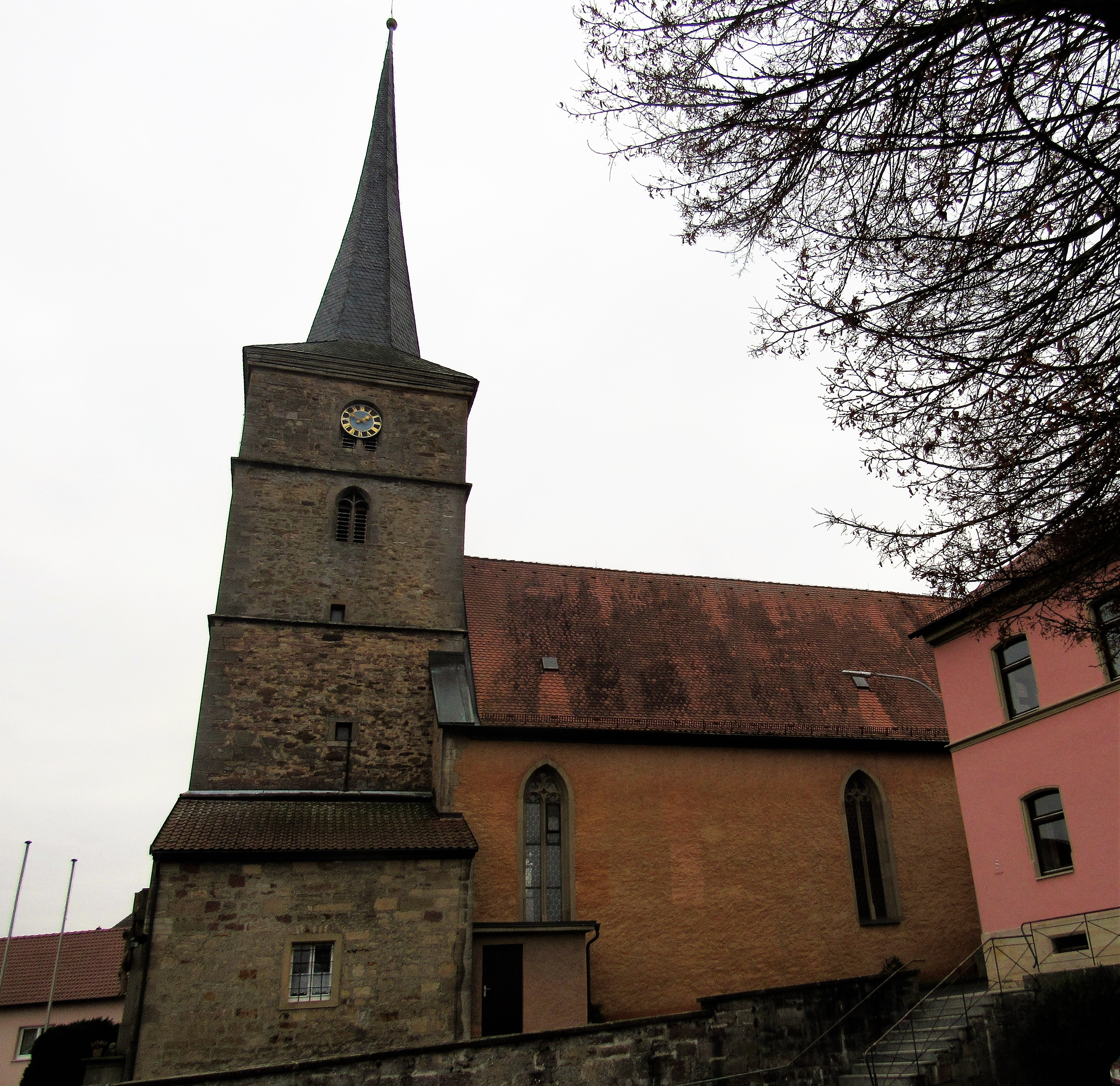 Kirche von Burglauer